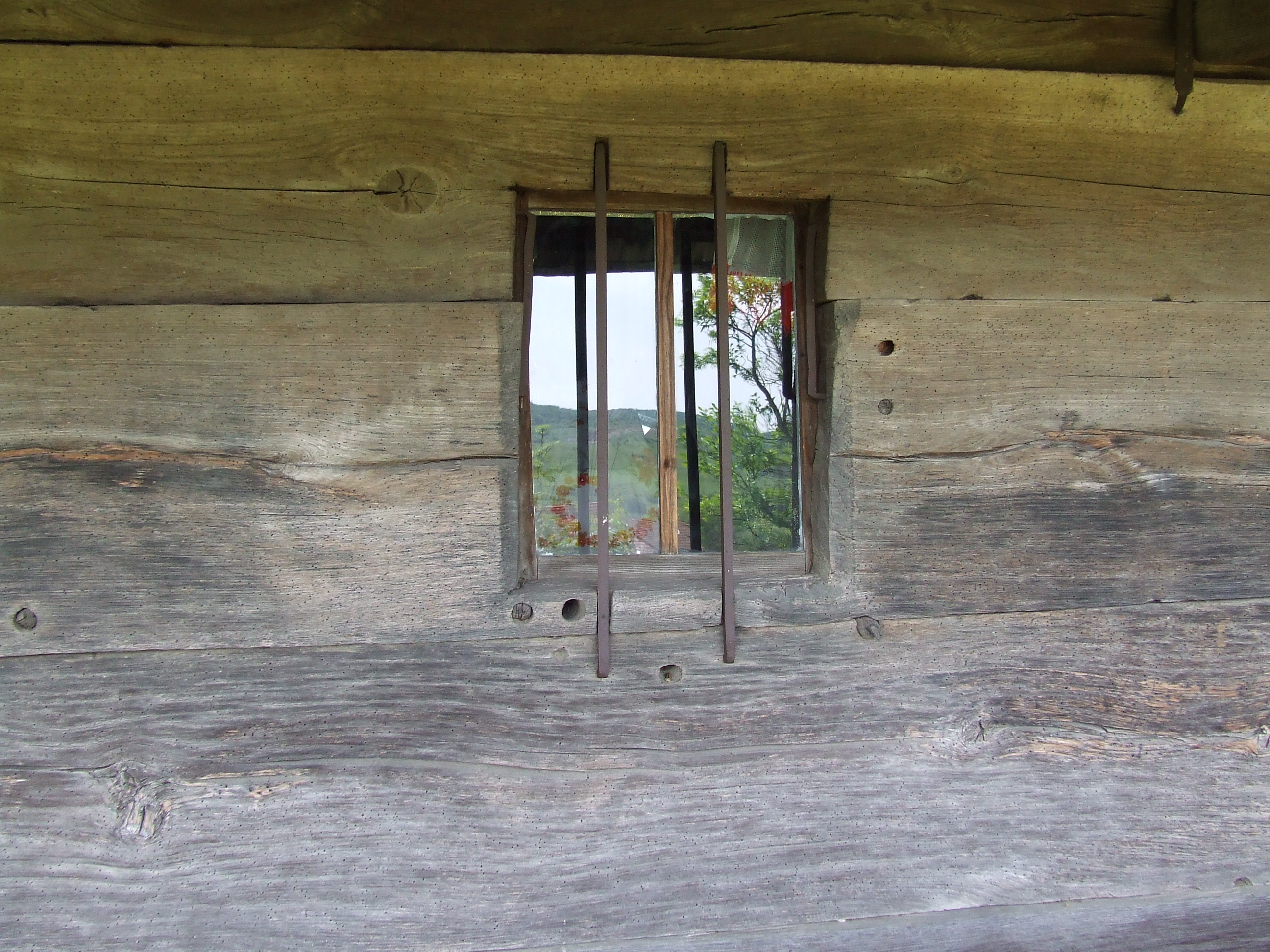 Biserica de lemn din Sumurducu. Fereastră.